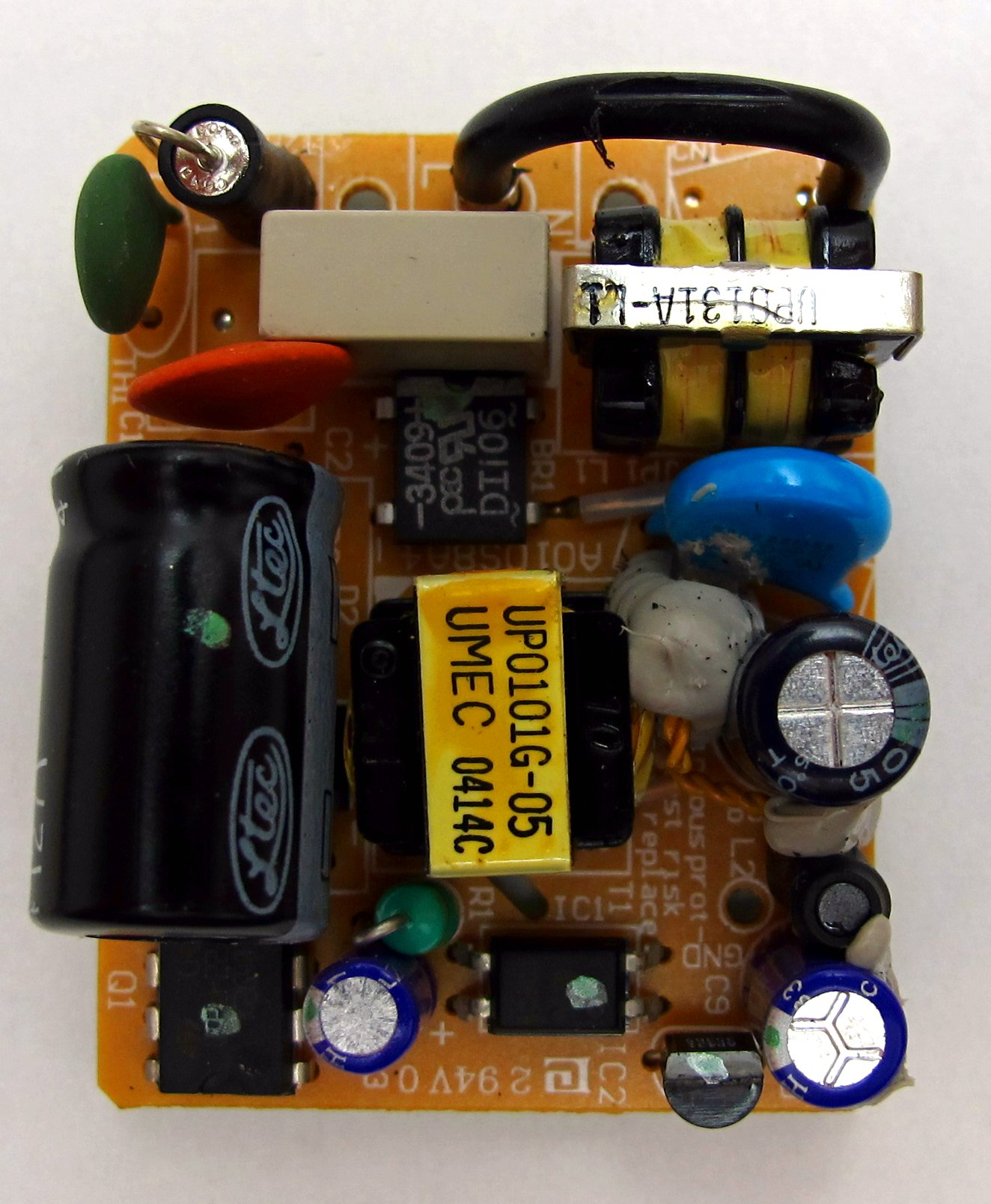 Leiterplatte eines Sperrwandlers (Schaltnetzteil), OEM. Eingangspannung 90V-249V/40-400Hz Ausgangsspannung +5V/1A